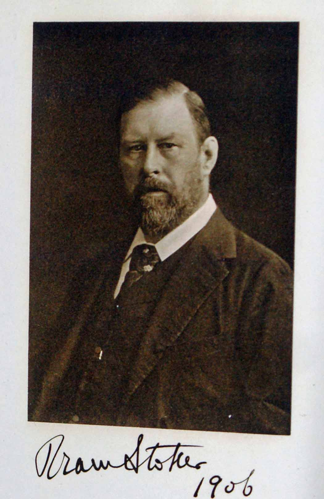 Photo dédicacée de Bram Stoker